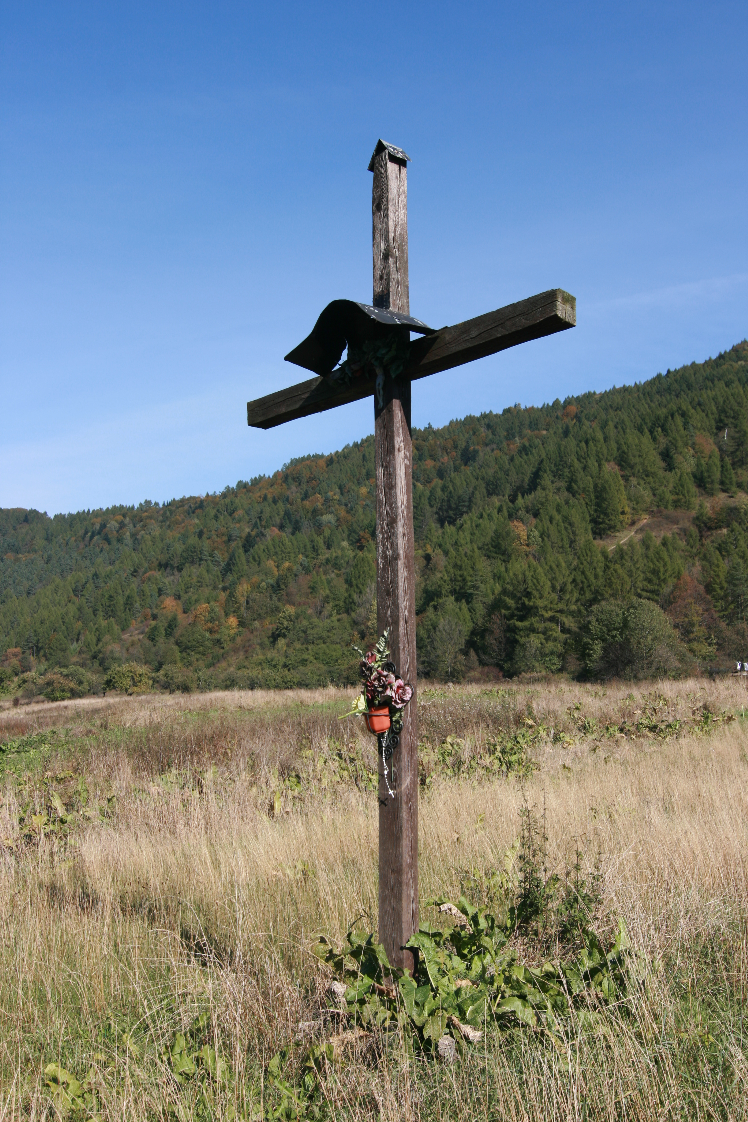 Krzyż choleryczny upamiętniający śmierć dwóch osób w połowie XIX wieku na równi Zawodzia w Krościenku nad Dunajcem